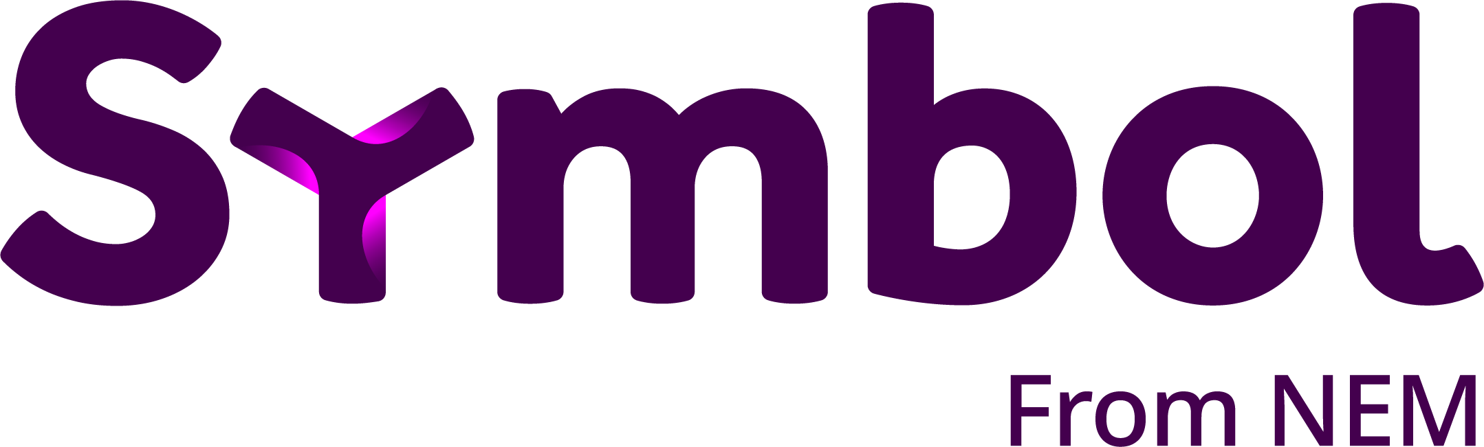 Logo Symbol